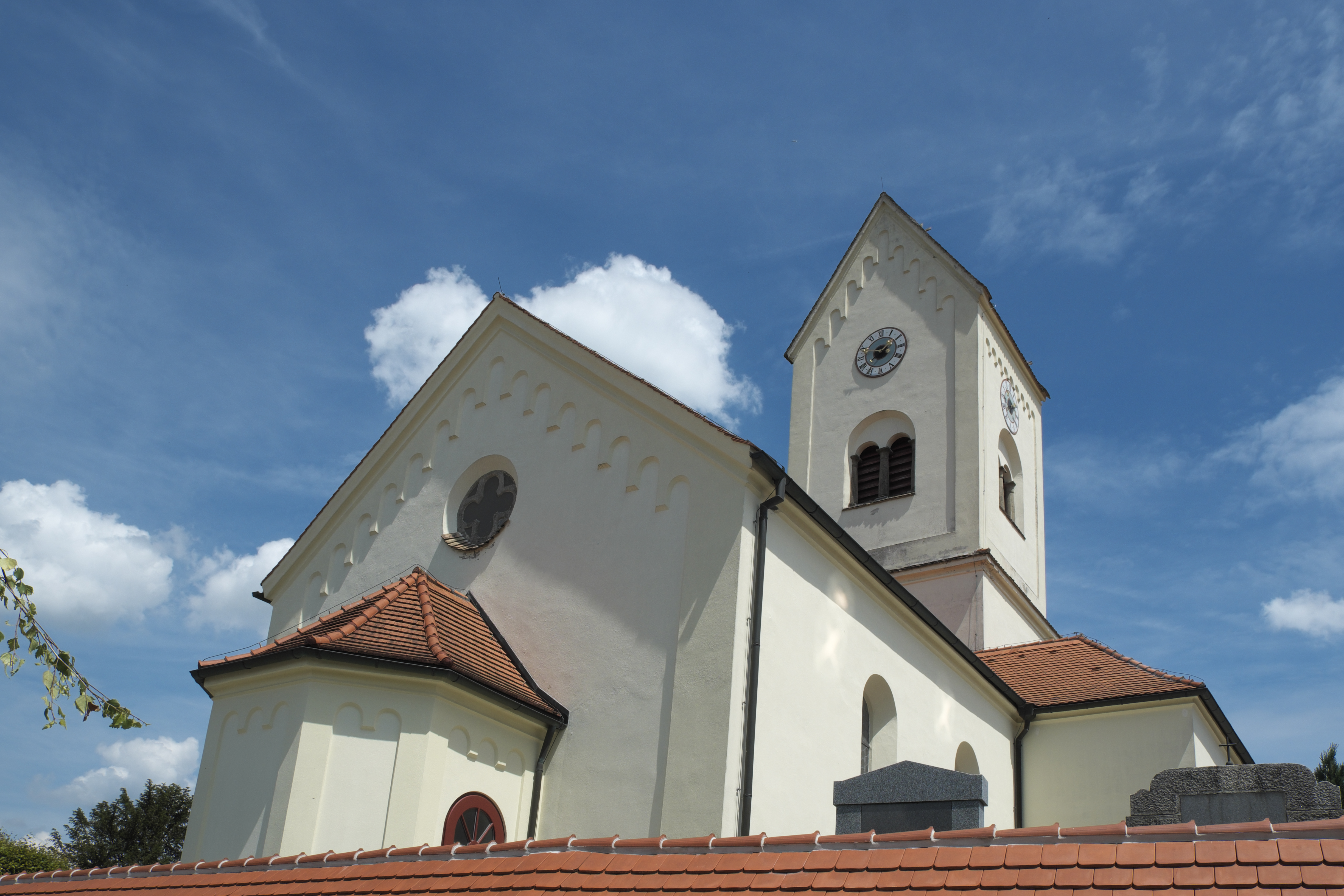 Pfarrkirche St. Johann Baptist in Machtlfing, einem Ortsteil der Gemeinde Andechs im Landkreis Starnberg (Bayern/Deutschland)